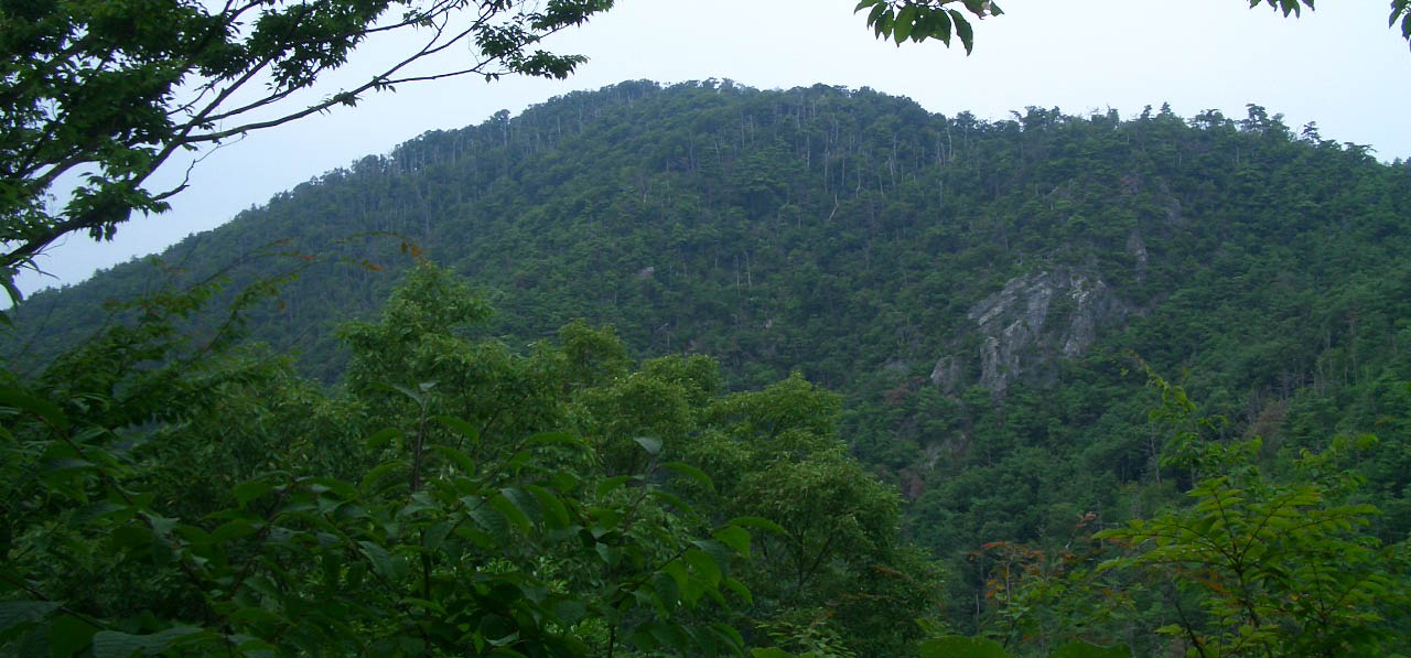 大嶽丸